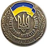 Знак к почётному спортивному званию «Заслуженный мастер спорта Украины»